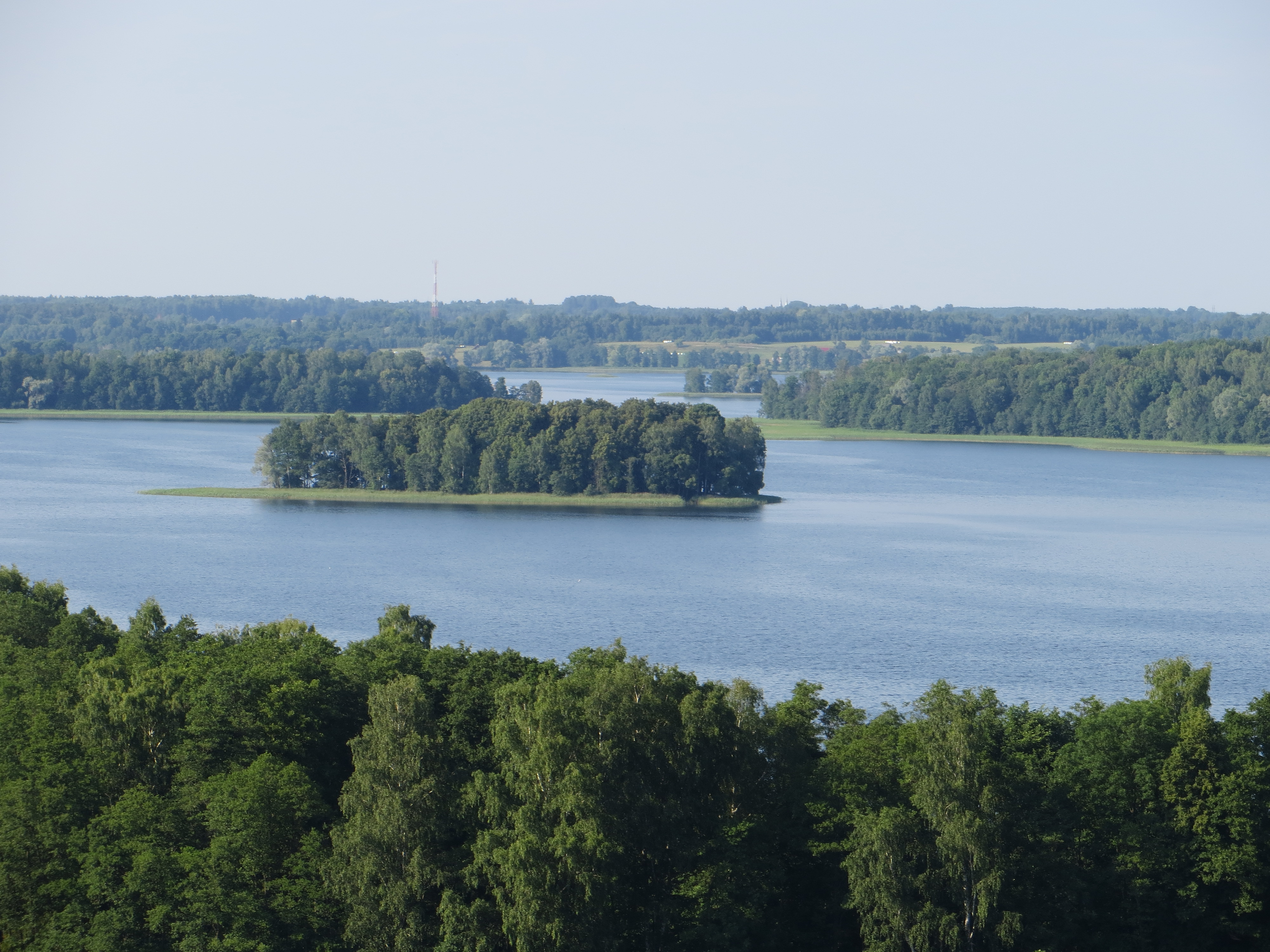 Anykščių sen., Lithuania